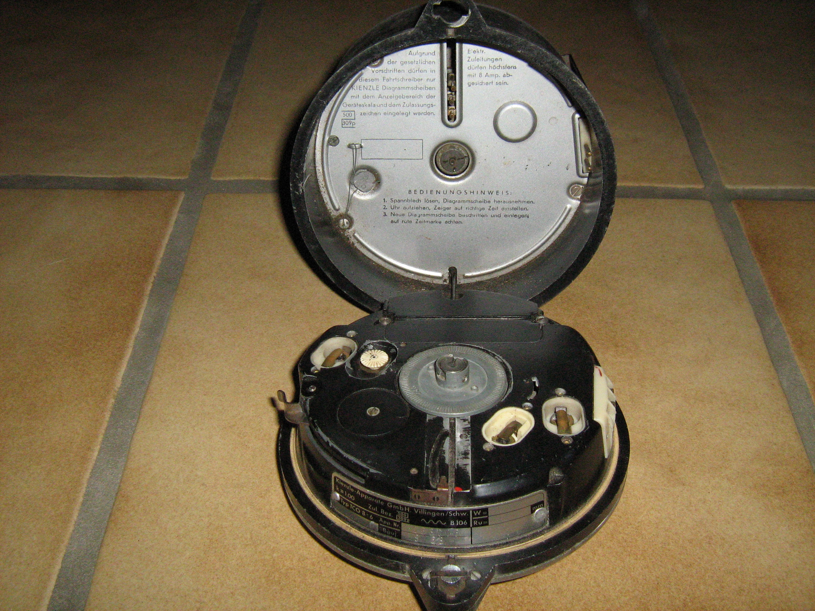 Tachograph aufgeklappt Bj.9,1958